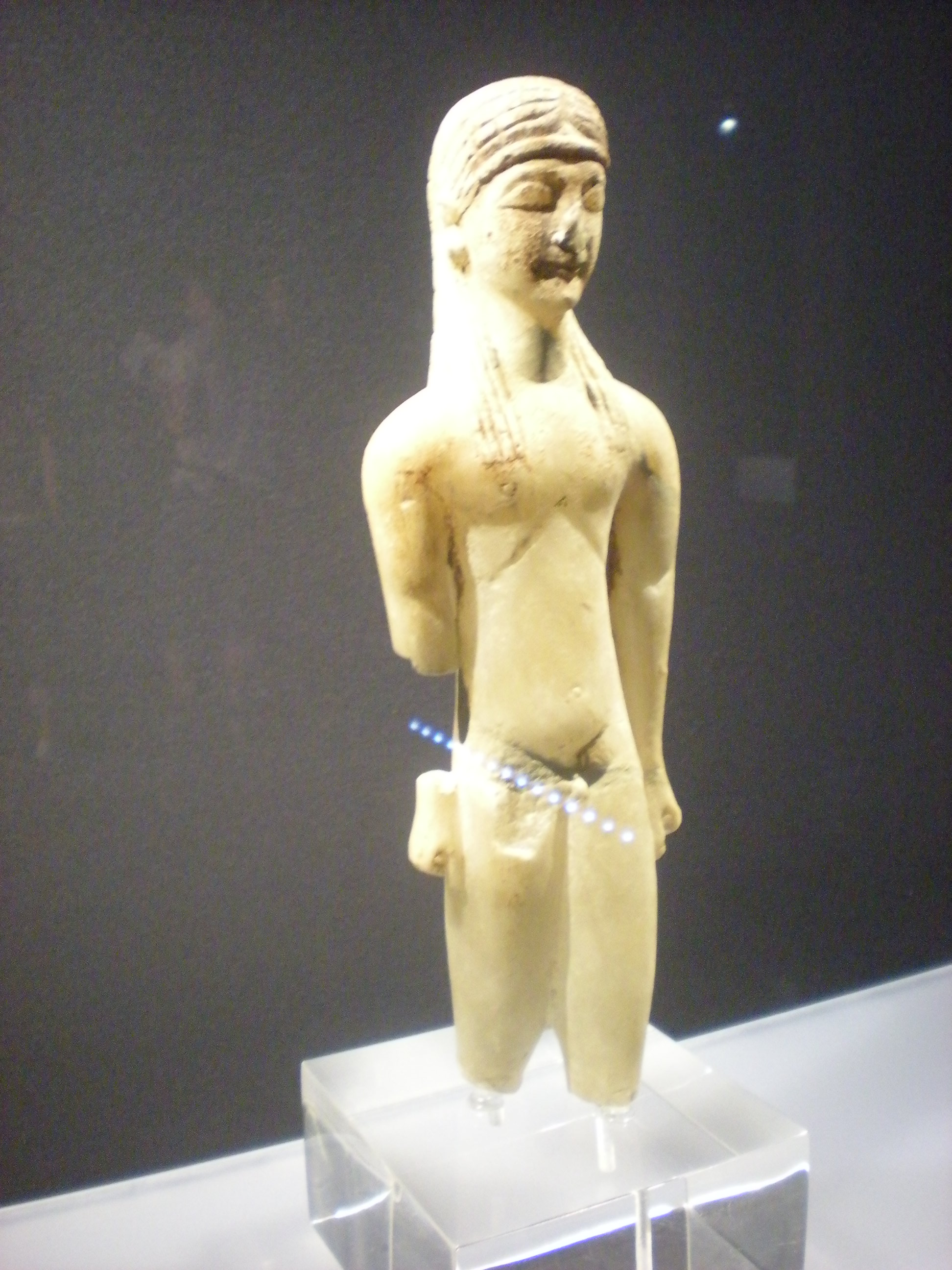 Estatuilla de un kouros de yeso pintado, versión en miniatura del kouros, un prototipo de la escultura griega arcaica, del siglo VI a. C. El cuerpo es una abstracción anatómica de un joven de excelencia física y moral (areté): cabello largo aristocrático, hombros anchos, cintura estrecha, muslos fuertes y labios con una perenne sonrisa de satisfacción. Conserva restos de pintura en el pelo y en el rostro. Las esculturas de la época arcaica solían pintarse y había figuras masculinas como ésta que en ocasiones llevaban un bigote pintado. Esta estatuilla, probablemente manufactura chipriota, procede de Naucratis, Egipto. Hacia 560 a. C. Medidas: 257 mm x 88 mm x 44 mm. GR 1888, 1006.1 (sculpture B438).